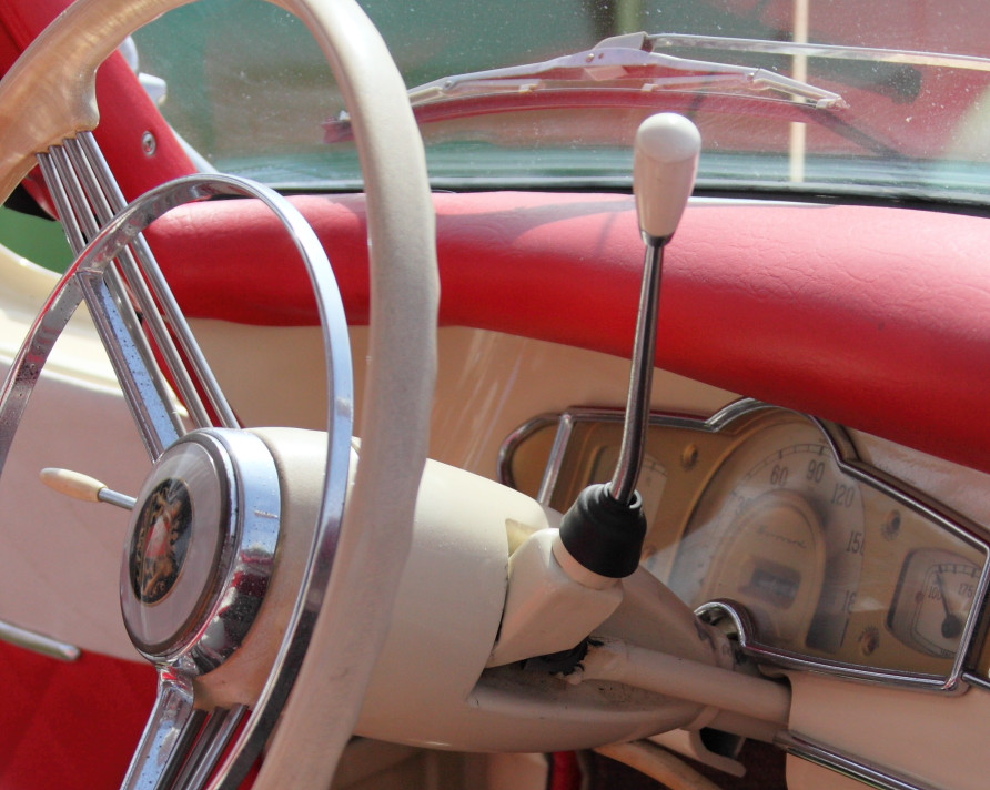 de: Lenkradschaltung einer Borgward Isabella, Handschaltgetriebe en: Gear Lever of a Borgward Isabella, manual Transmission